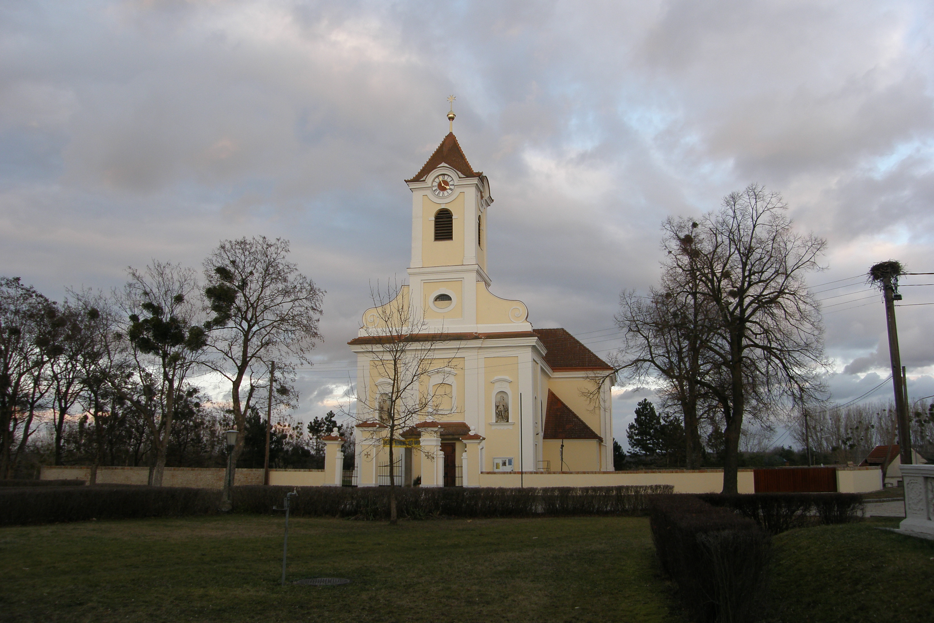 Kath. Pfarrkirche hl. Helena und ehem. Friedhof